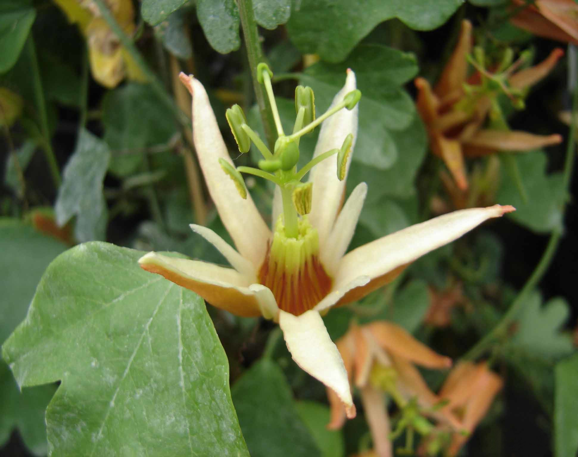 Passiflora aurantia G. Forster, subgénero Decaloba. Fotagrafía tomada en la colección nacional de Passiflora en Blois, Francia.